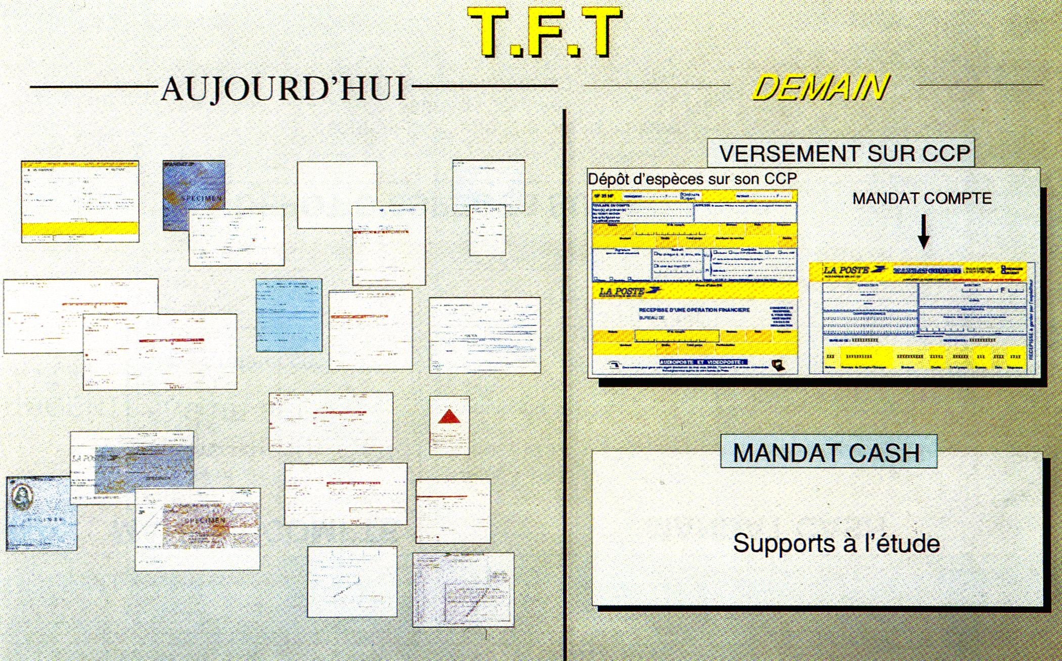 Explication générale sur nouveau procédé de mandat